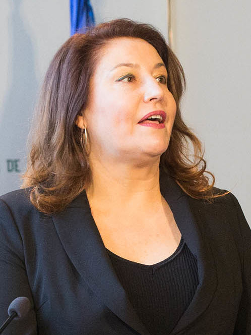 La conservatrice Carmen Crespo.